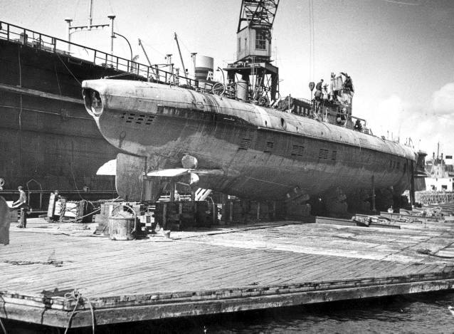 HMS Ulven var en ubåt i den svenska flottan. Den ingick tillsammans med de andra ubåtarna HMS Gripen och HMS Draken i den så kallade Göteborgseskadern. I april 1943 försvann Ulven efter en övning utanför Marstrand. I början av maj hittades Ulven på femtio meters djup sprängd av en drivande tysk mina. Här ses vraket i en flytdocka vid Eriksbergsvarvet.